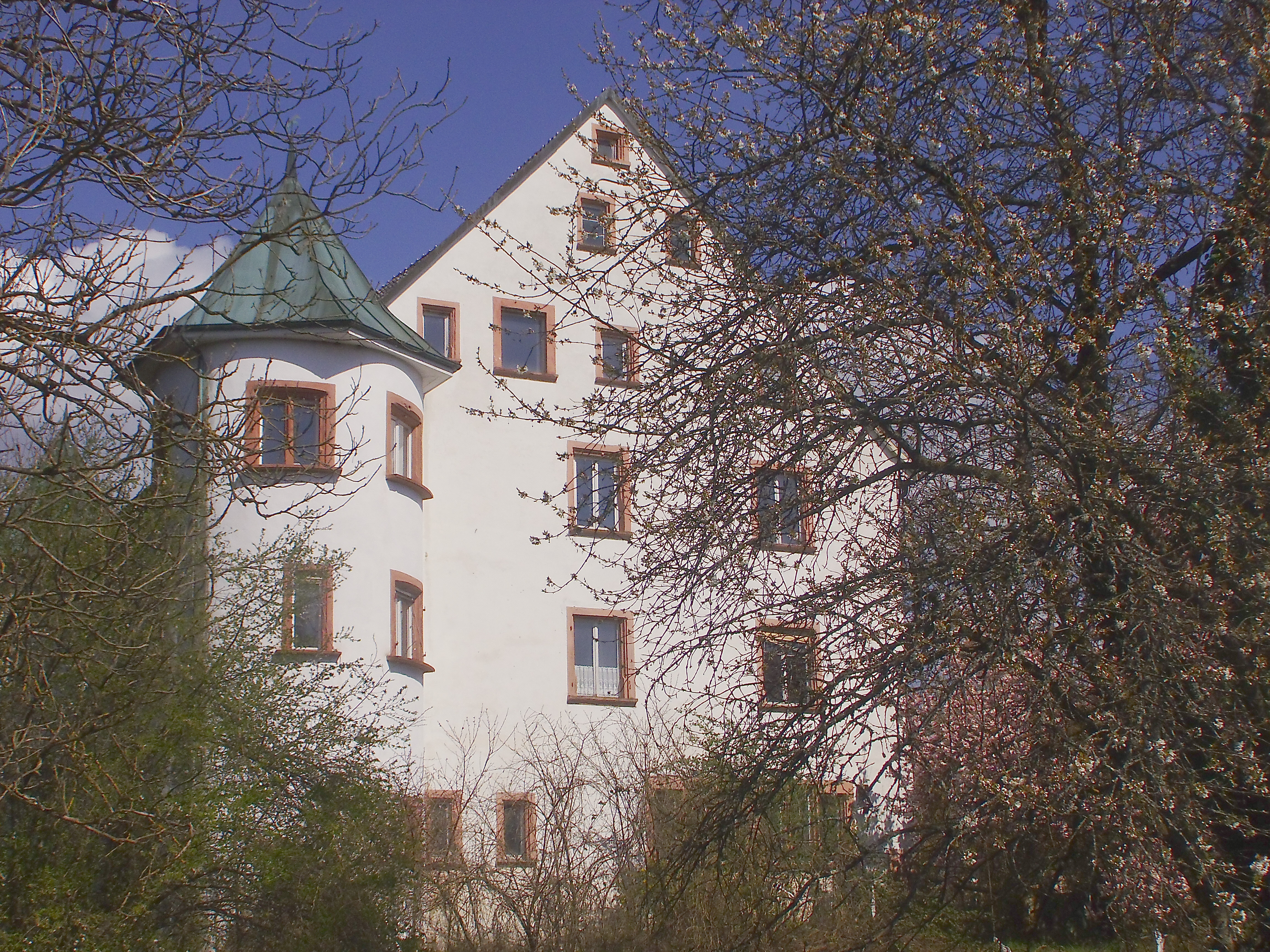 ehemaliges Wasserschloss Steinen